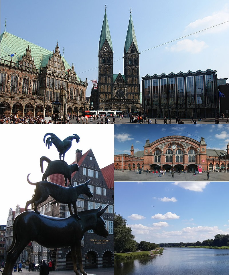 Photo montage of Bremen, Germany.